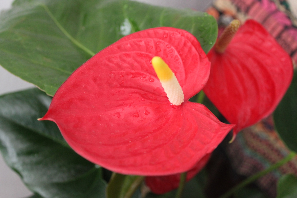 אנטוריום